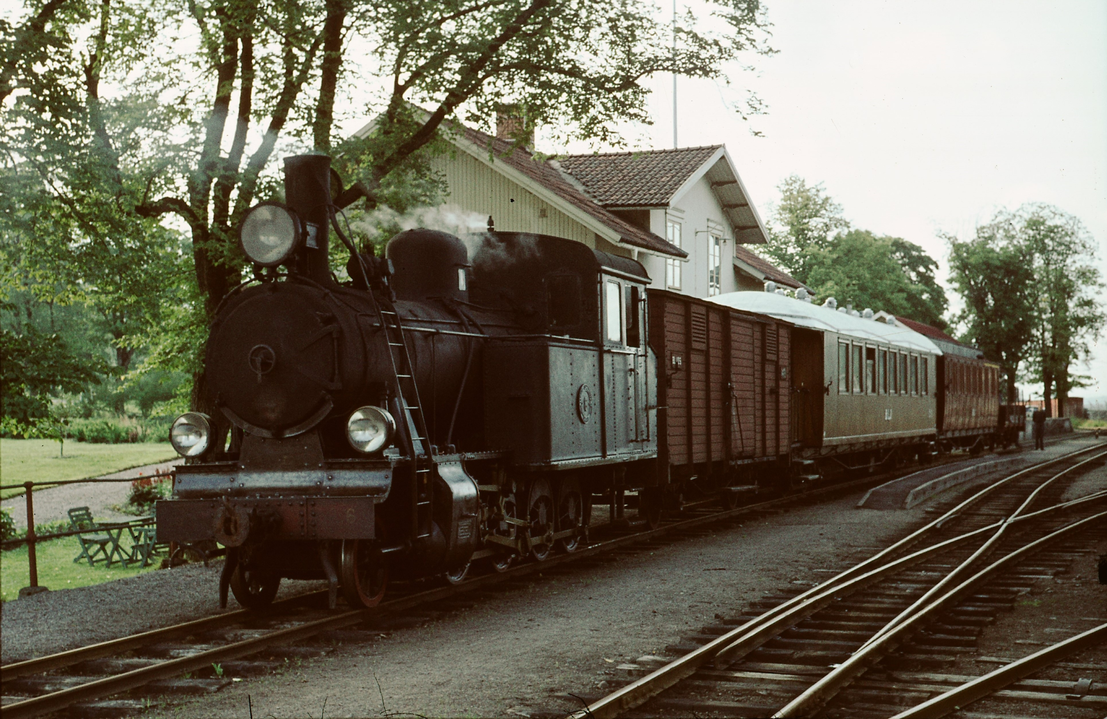 Blandat tåg draget av BLJ 6 vid Långshyttans station. BLJ 6 är bevarat som museilok vid Anten-Gräfsnäs Järnväg.